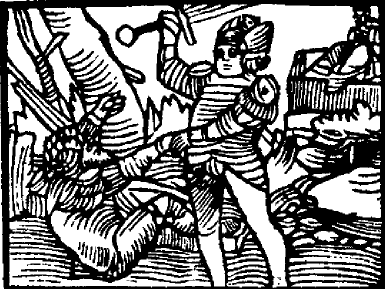 Hie wirdt der Ryß Kuperan trewloß an dem Hürnen Seyfrid vnd schlecht jn hinderwertling, das er zu der erden fiel.